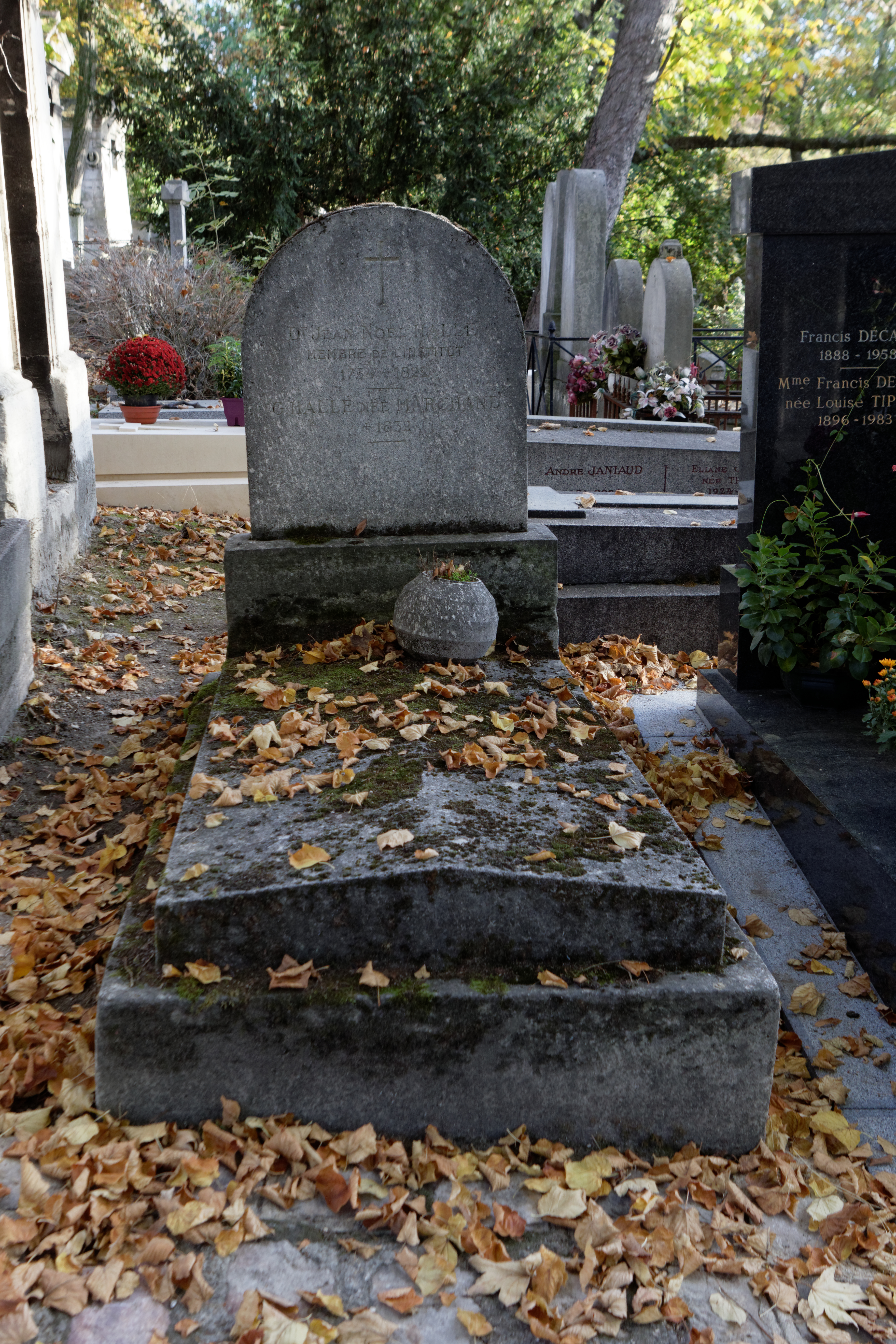 Sépulture de Jean Noël Hallé (1754-1822), médecin. Promoteur de la vaccination et de l'enseignement de l'hygiène, il est surtout connu pour avoir été premier médecin de Napoléon.